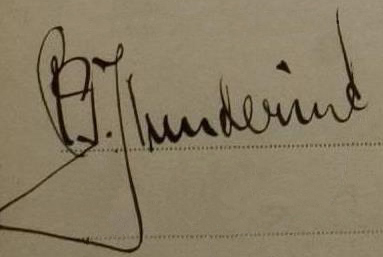 Подпись Руфа Вюндеринка